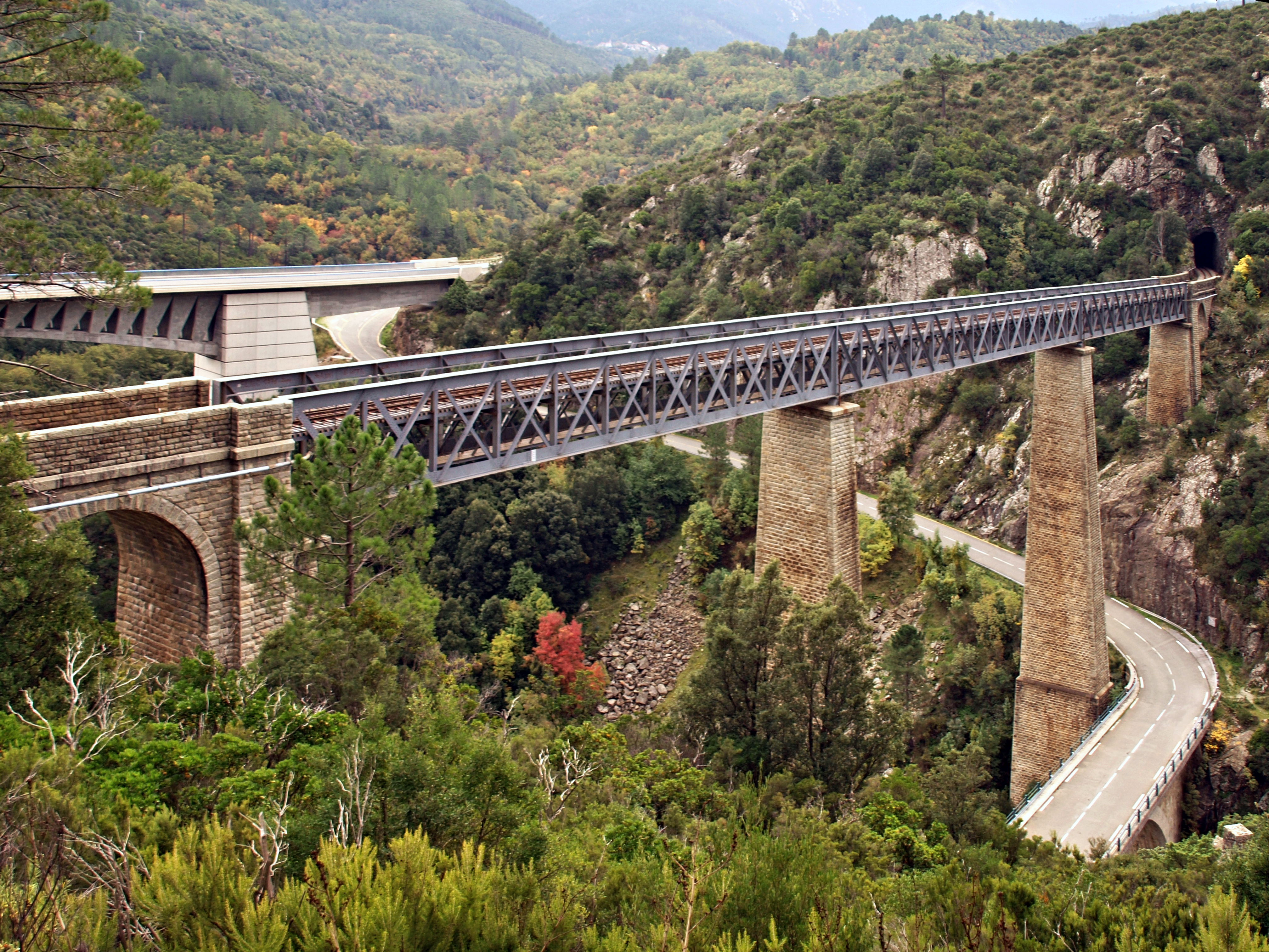 Venaco (Haute-Corse) - Les 3 ponts (viaduc Eiffel, ex-RN 197 et nouveau RT 20 ou "Pont Baggioni") sur la rivière Vecchio